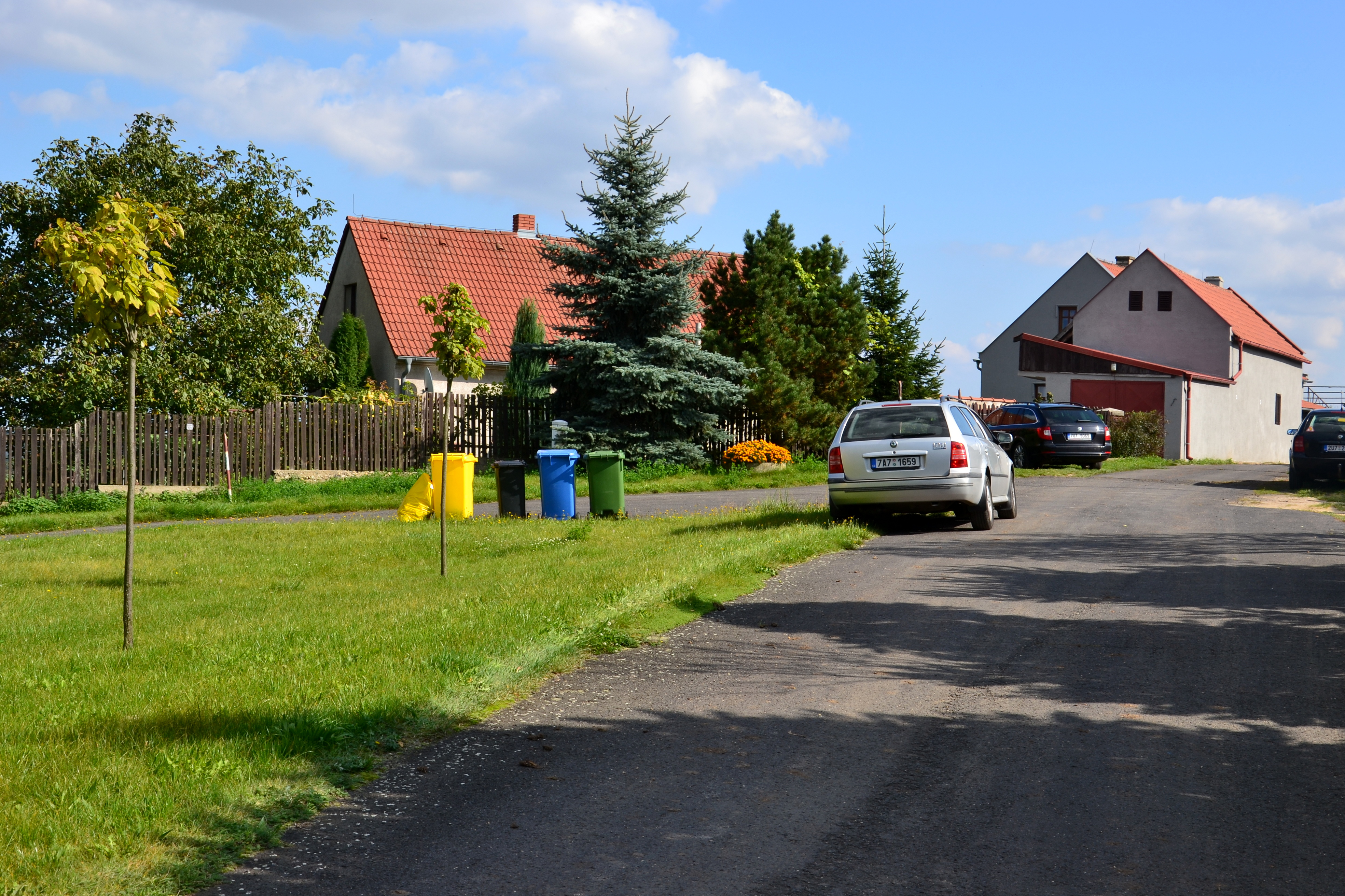 Roztyly - domy na návrší v jihovýchodní části osady